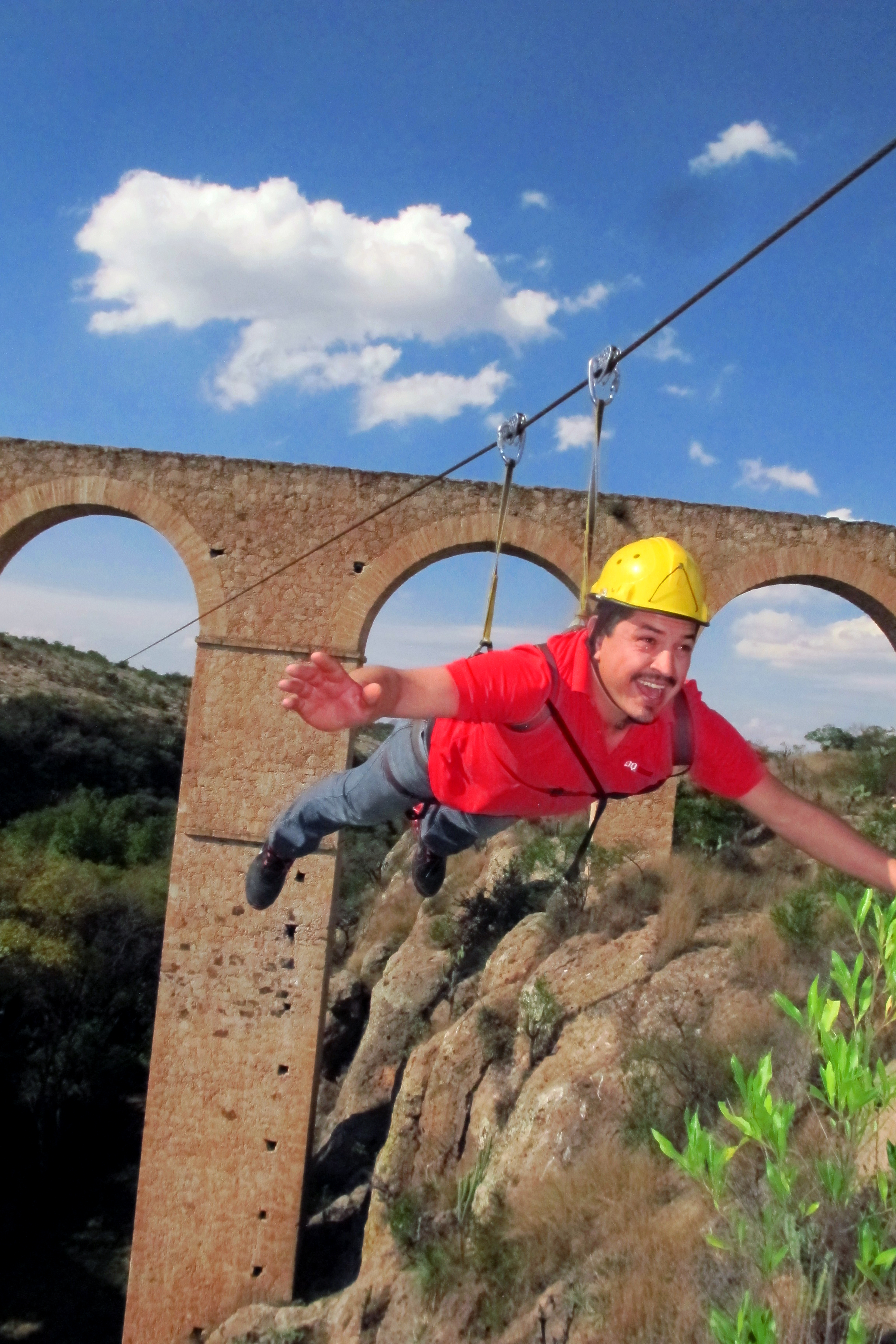 400 metros de tirolesa en los arcos más altos del mundo